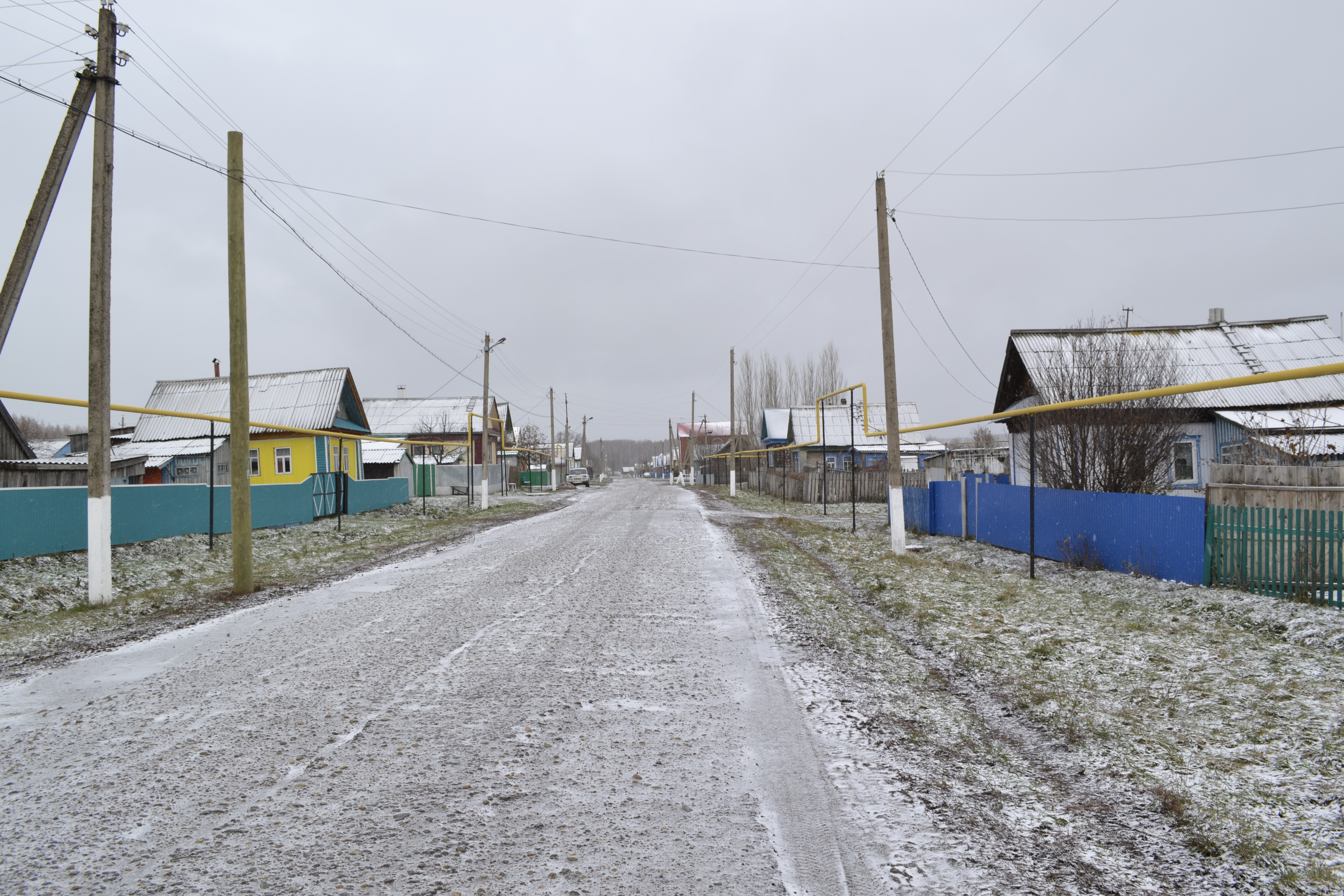 Башҡортса: Яңауыл районы Ҡомалаҡ ауылы урамы. Ансар Нуретдинов архивынан.